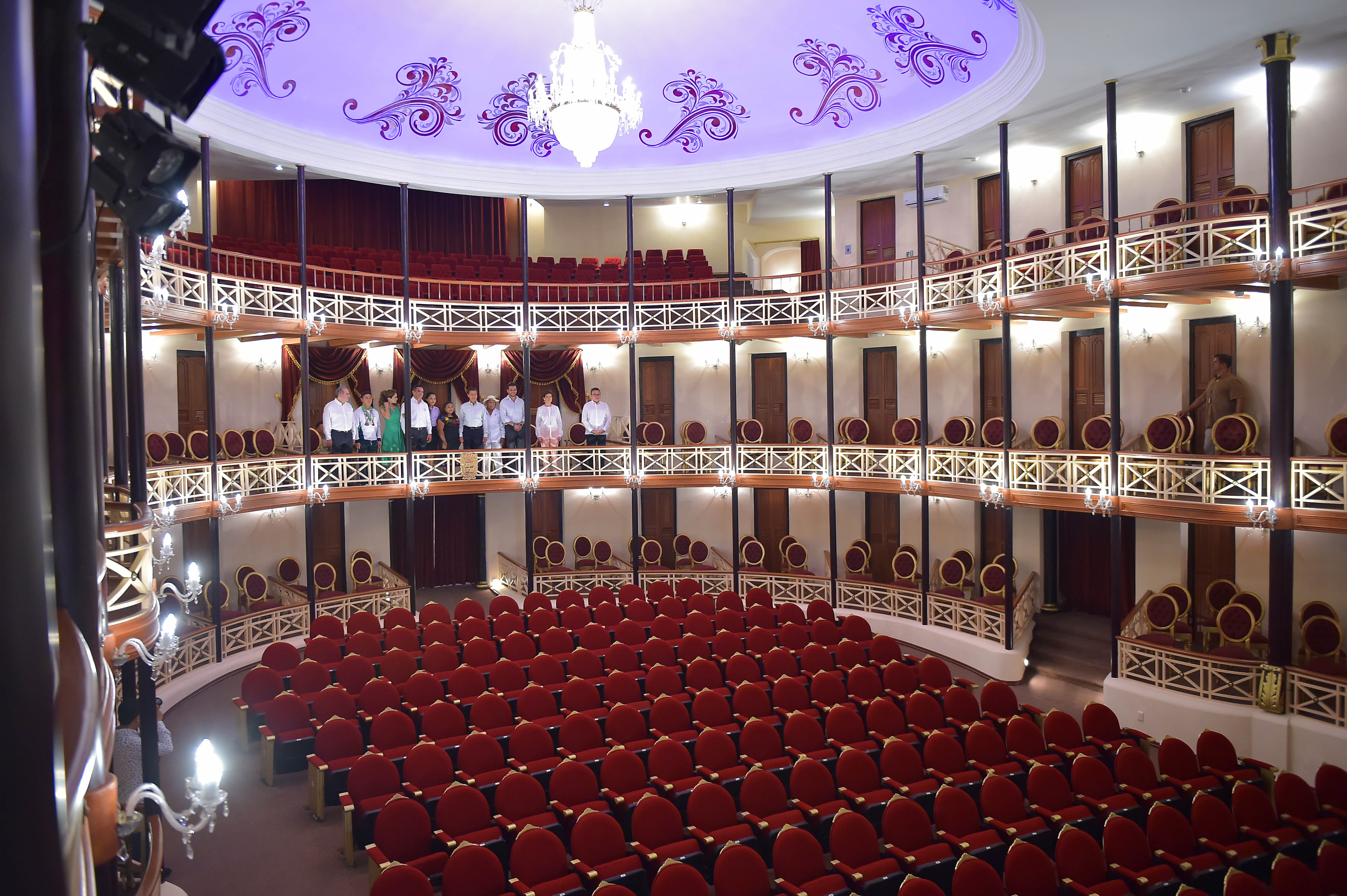 Inauguración de las obras de remodelación del Teatro “Francisco de Paula Toro”. El Presidente Enrique Peña Nieto inauguró las obras de remodelación del Teatro “Francisco de Paula Toro” y recorrió el recinto.